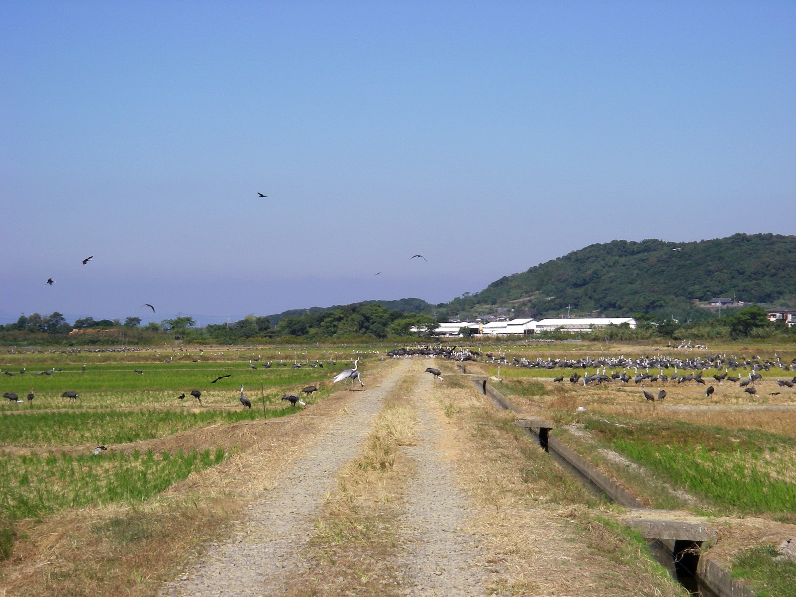 Cranes flying in Izumi, Kagoshima.